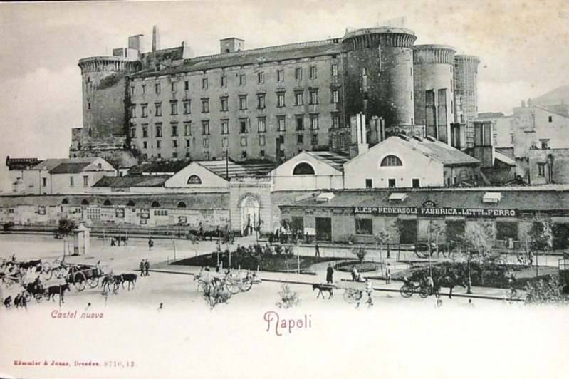 Napoli, Piazza Municipio e Castel Nuovo (prima della risistemazione deella piazza). Cartolina. Autore sconosciuto.